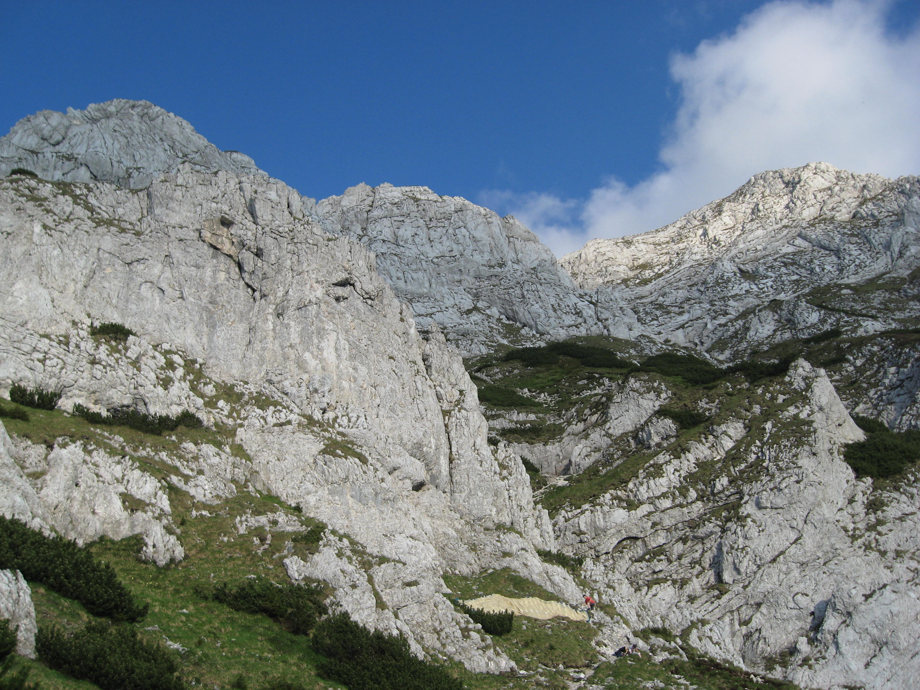 Masivul Piatra Craiului. La lanturi spre Om